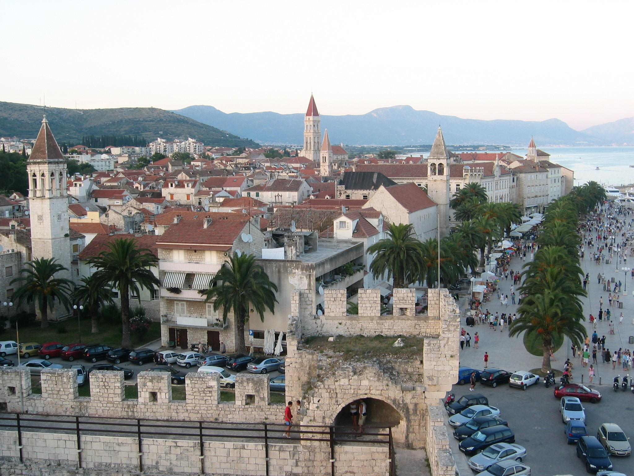 Pululando por Croacia